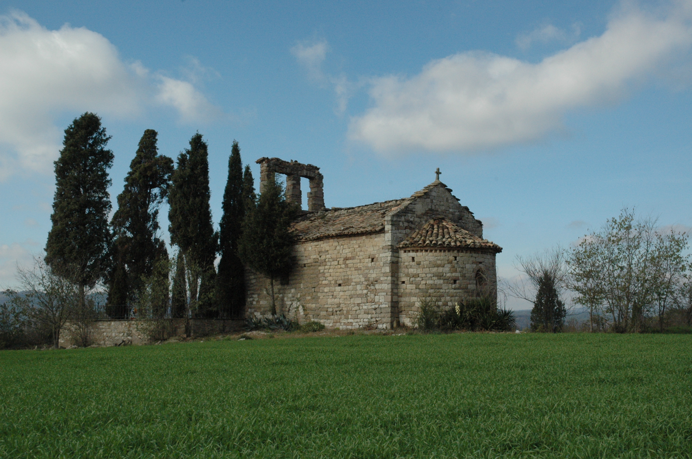 foto de l'església de Serrasanç, en el terme de Sallent, Bages.